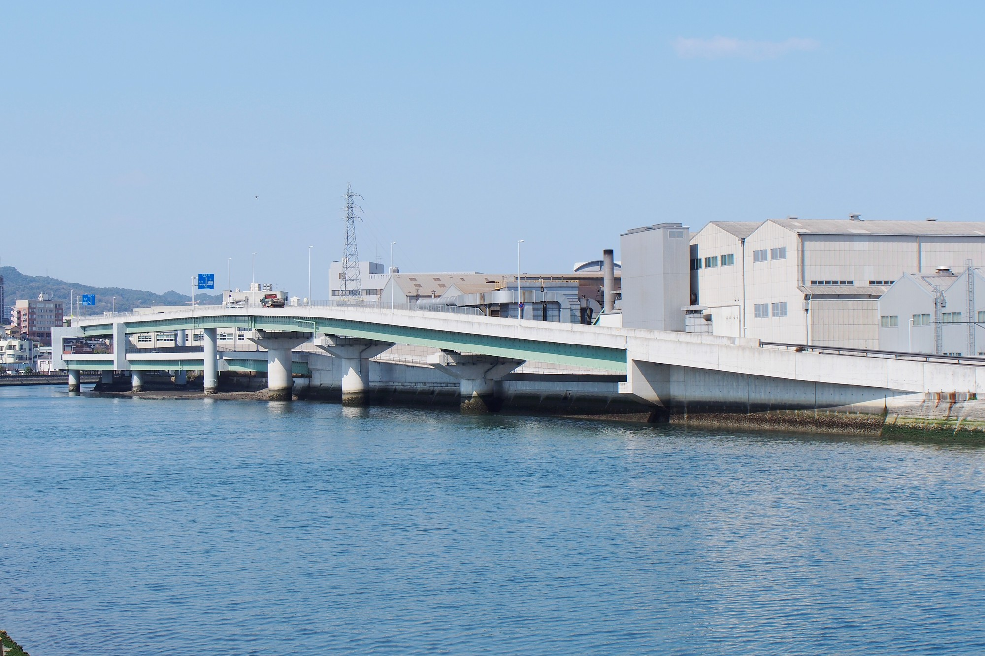 長崎県道112号線の浦上川線高架区間（長崎県長崎市）。